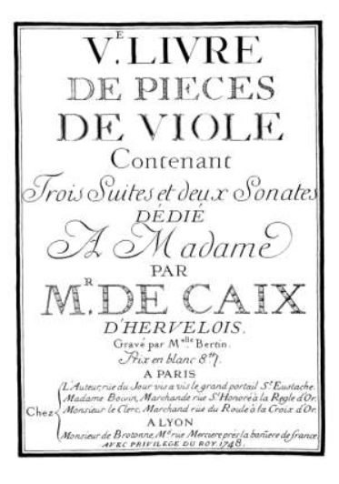 Title page of Louis de Caix d'Hervelois Ve livre de pièces de viole (Paris, 1748).